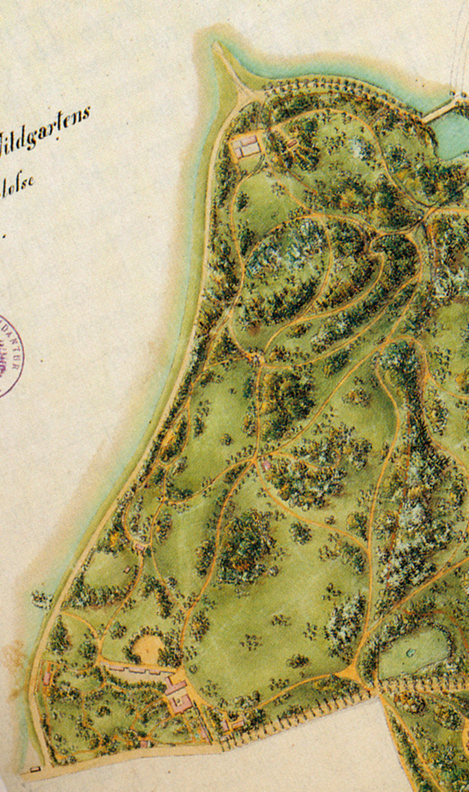 "Situationsplan" des Glienicker Parks von P. J. Lenné